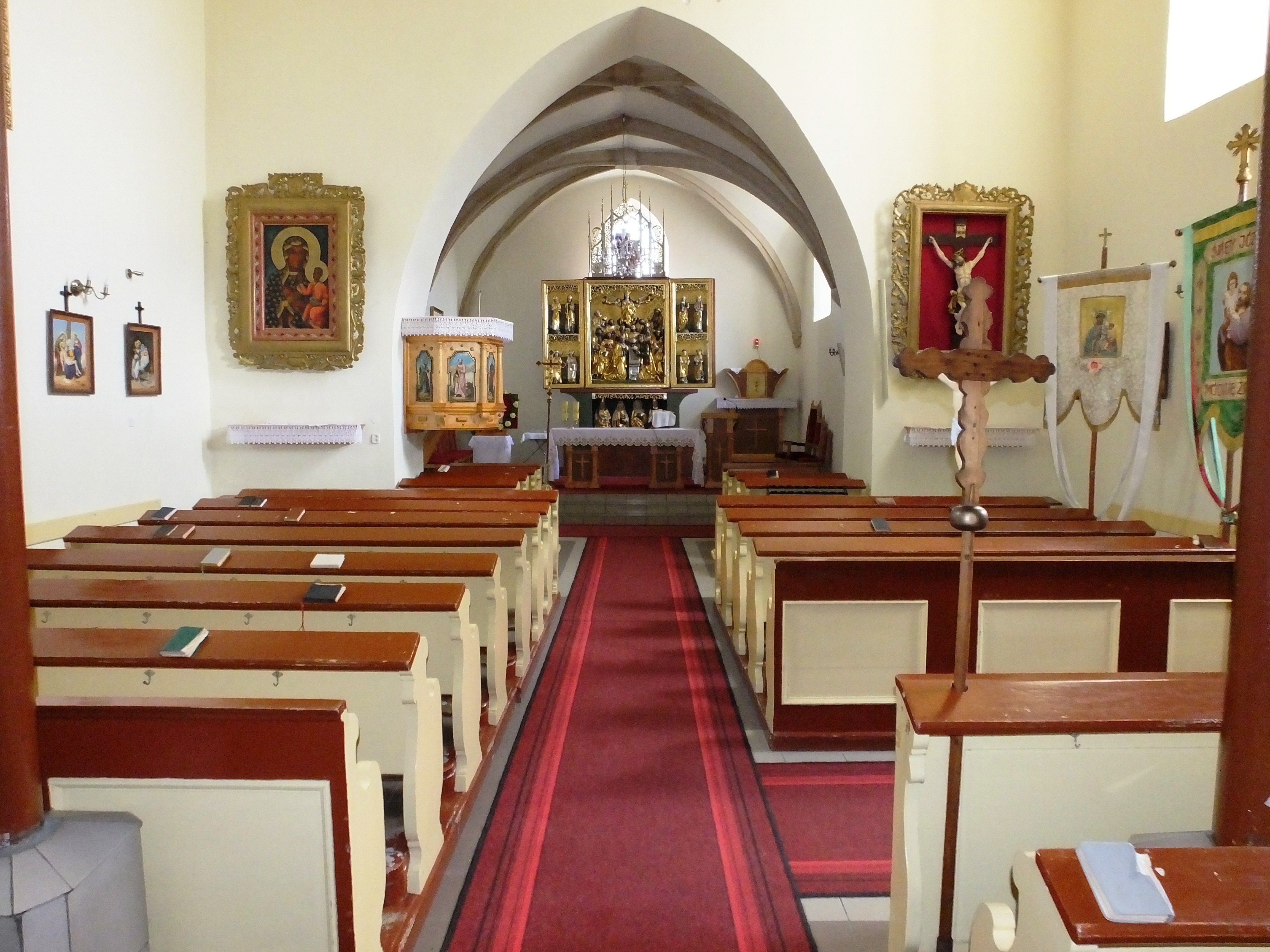 Wnętrze kościoła w Pisarzowicach k/Kamiennej Góry